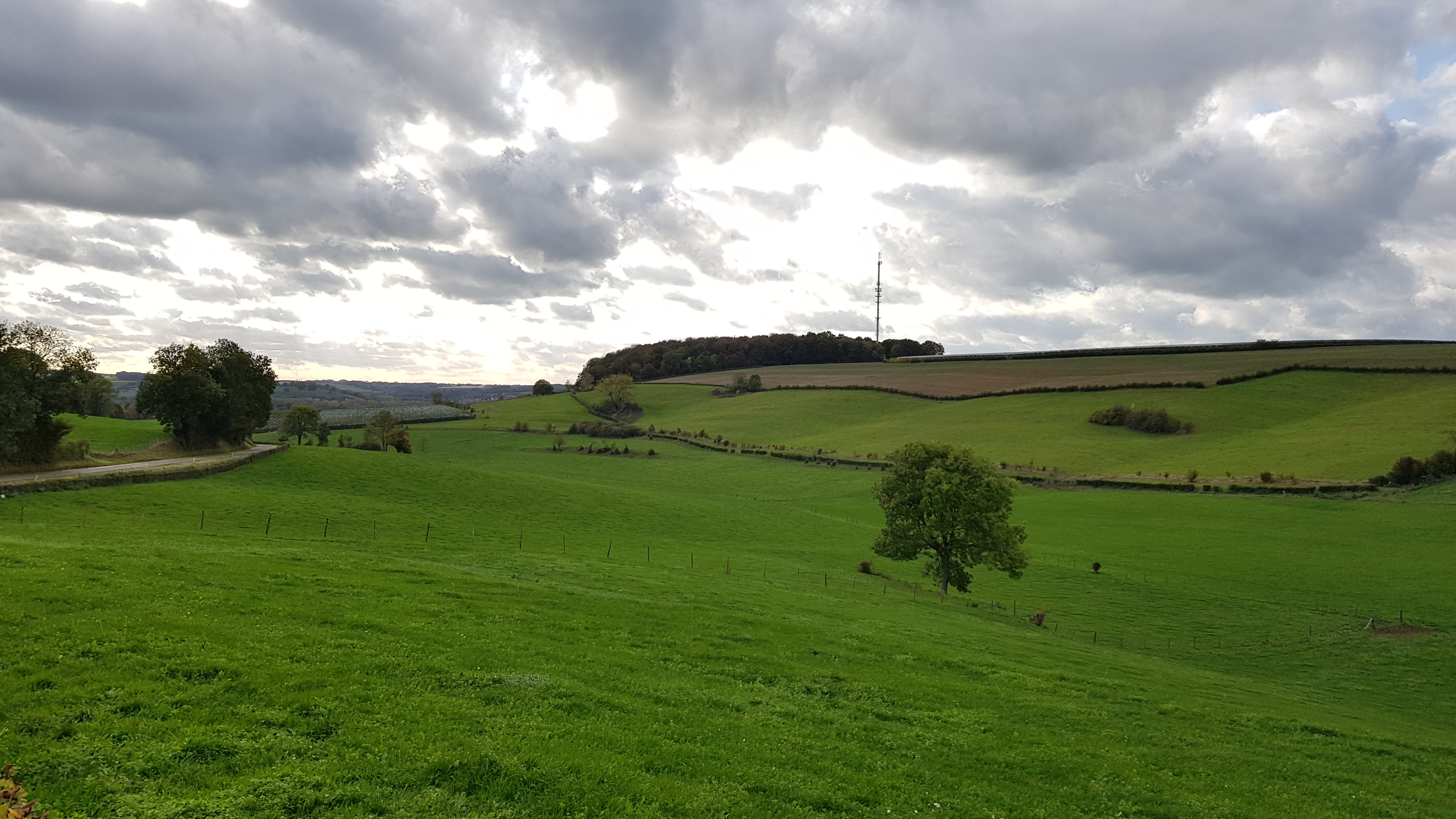 Grachterdalgrub bij Eys, Zuid-Limburg, Nederland